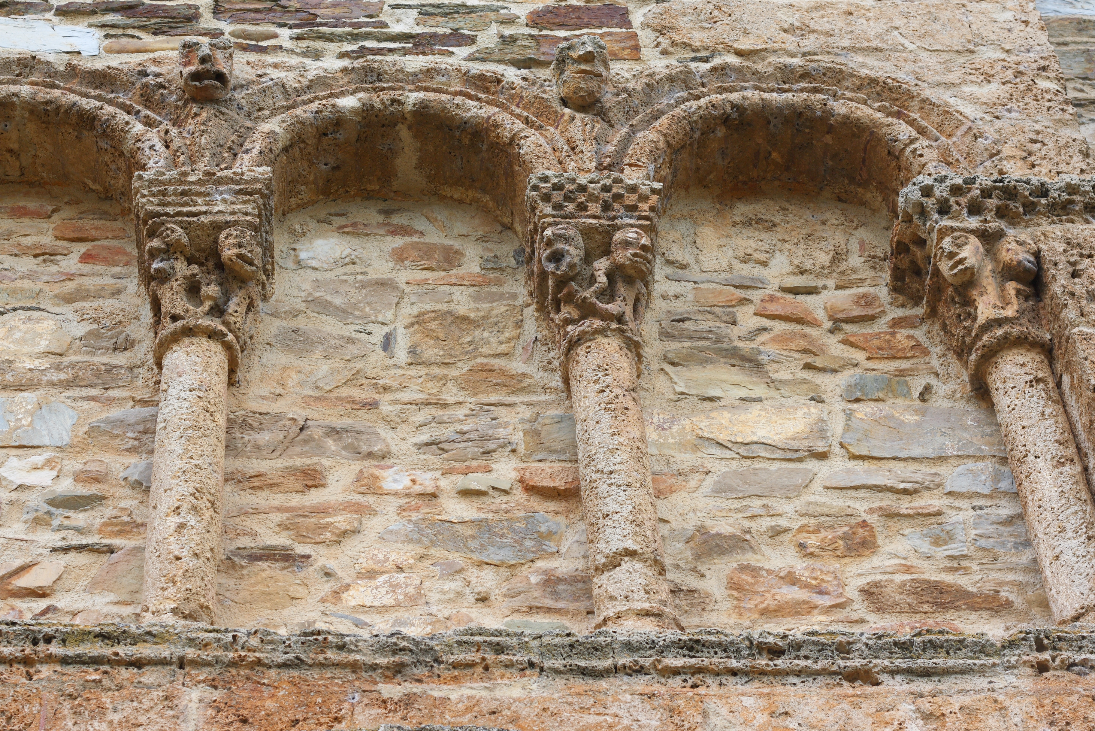 Katholische Kirche San Miguel in Corullón, einer Gemeinde in der spanischen Provinz León (Kastilien und León), romanische Rundbogenarkaden mit skulptierten Kapitellen und Köpfen in den Bogenzwickeln